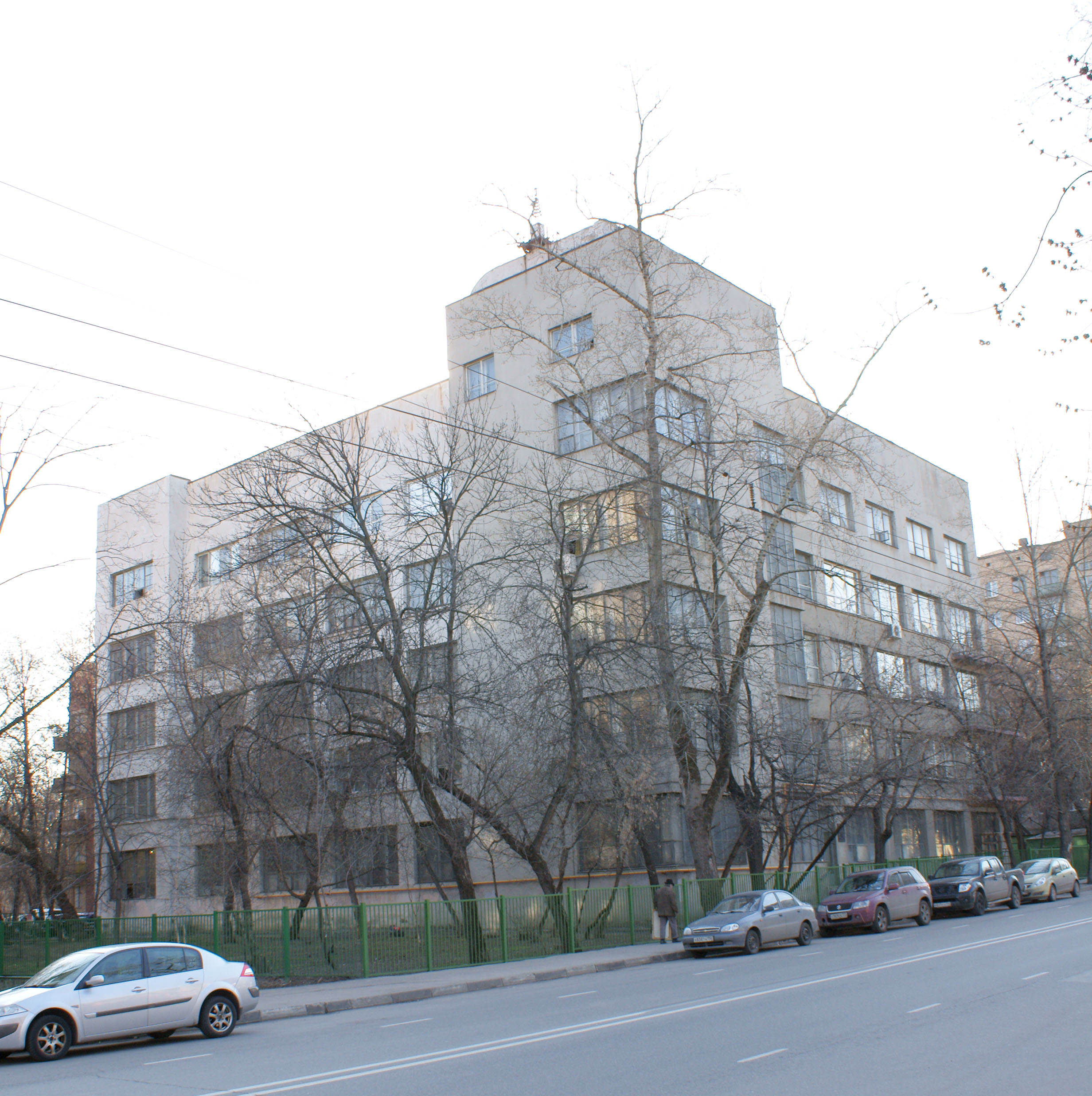 дом 9 на улице Верхняя Масловка в Москве